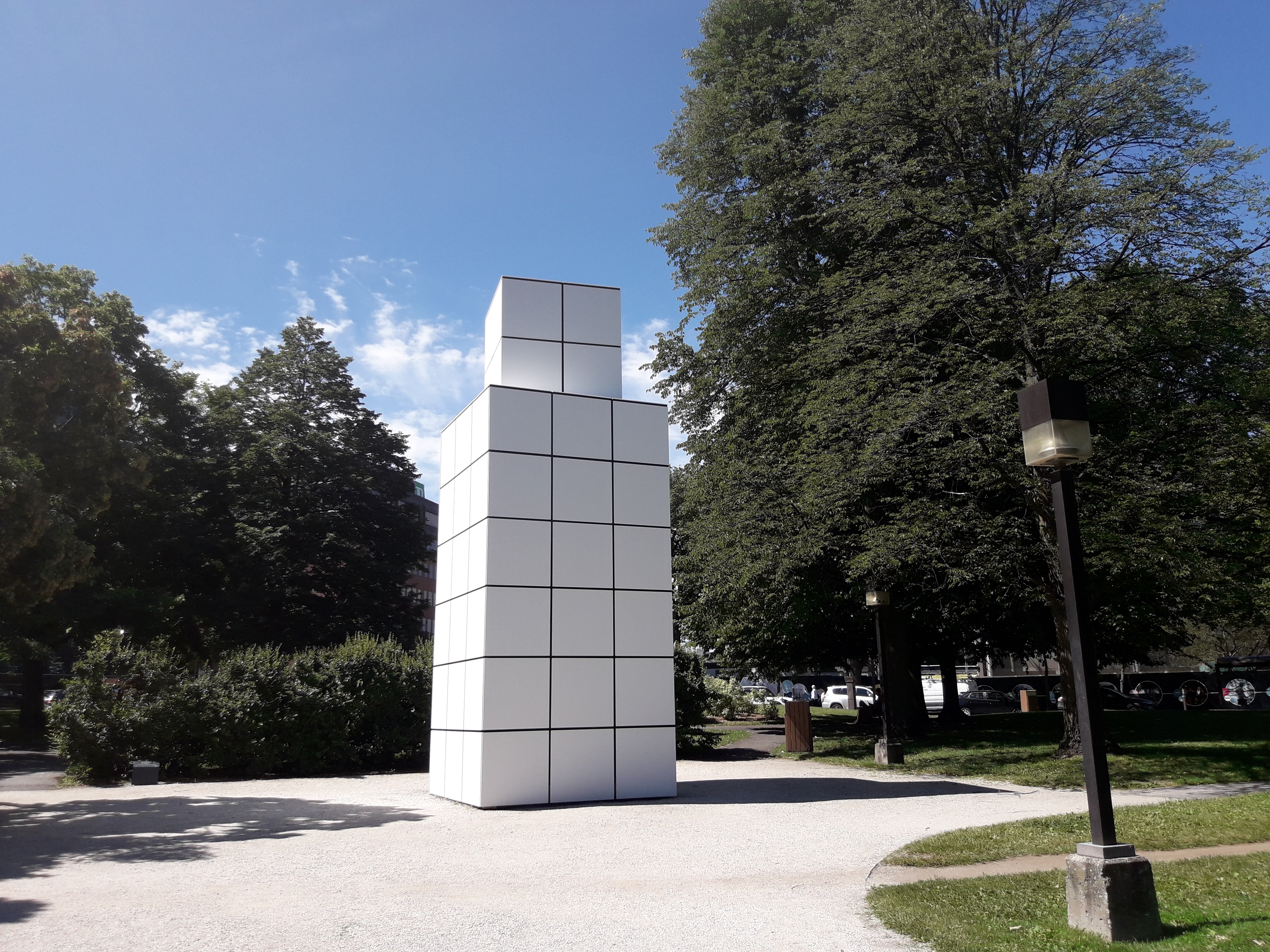 Vue de l'œuvre Autoportrait du plasticien Jean-Pierre Raynaud installée au parc de l'Amérique-française (Québec, Canada) en 2018. Elle reprend les formes de Dialogue avec l'histoire, une autre œuvre de l'artiste démolie en 2015.